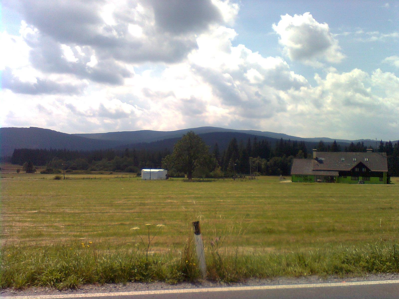 Widok z Rejvízu na szczyty Zámecký vrch (1), Medvědí vrch , Orlík, poniżej Přední Jestřábí oraz Orlík-Z i Orlík-SZ (nad Pensjonatem Orlík)